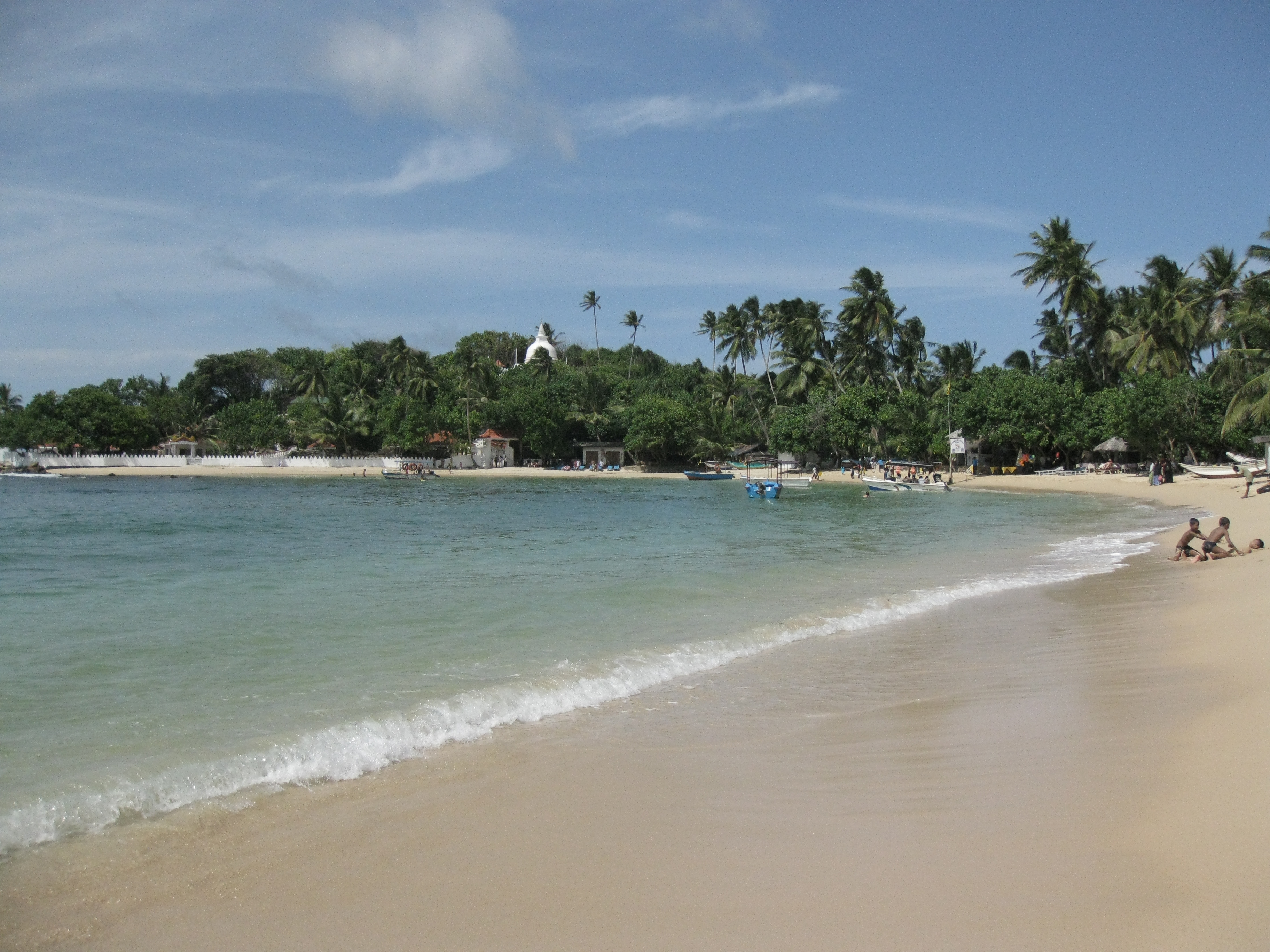 Stranden i Unawatuna